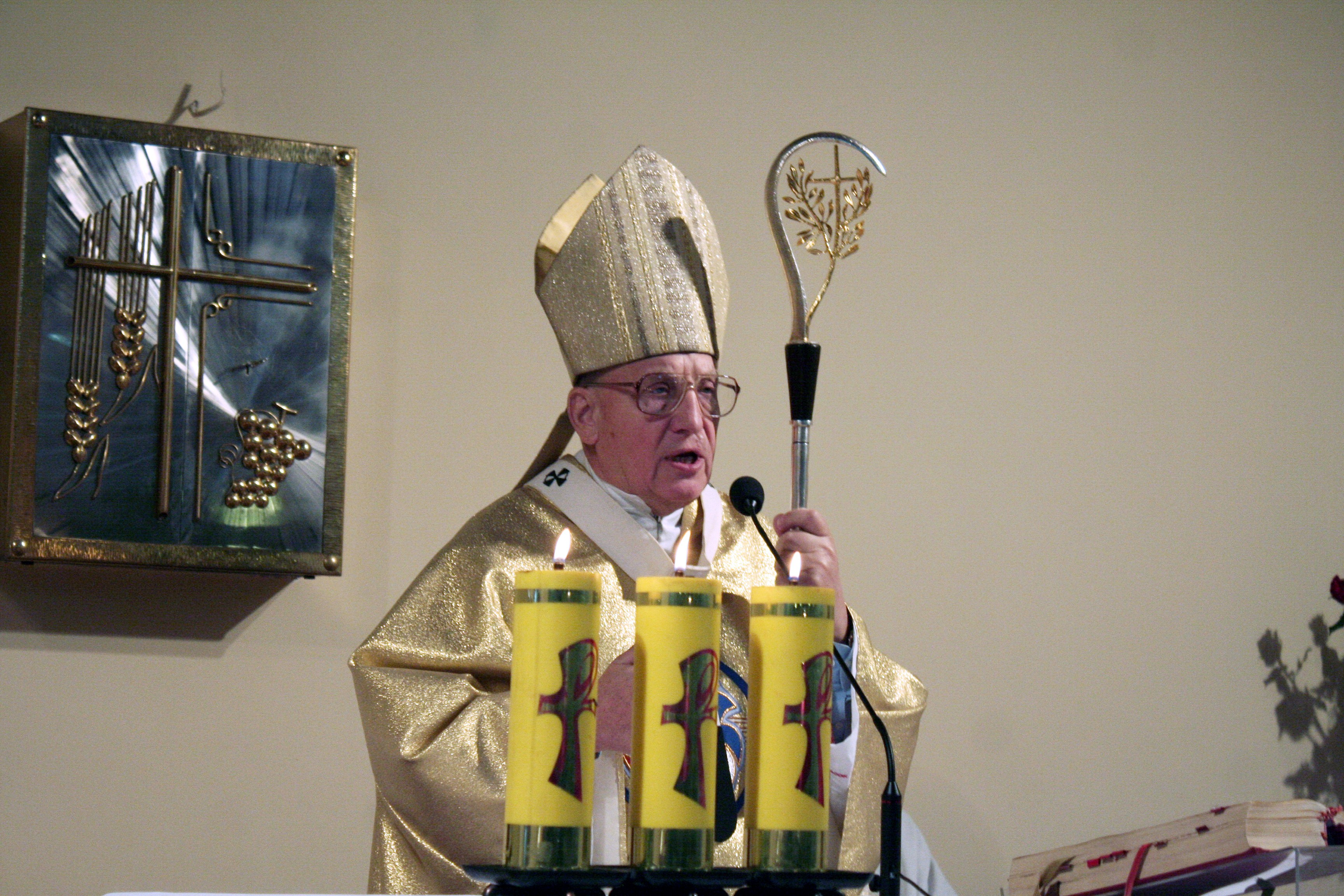 Беларуская (тарашкевіца): Тадэвуш Кандрусевіч, каталіцкі арцыбіскуп Мітрапаліт Менска-Магілёўскі пад час імшы ў Баранавічах.